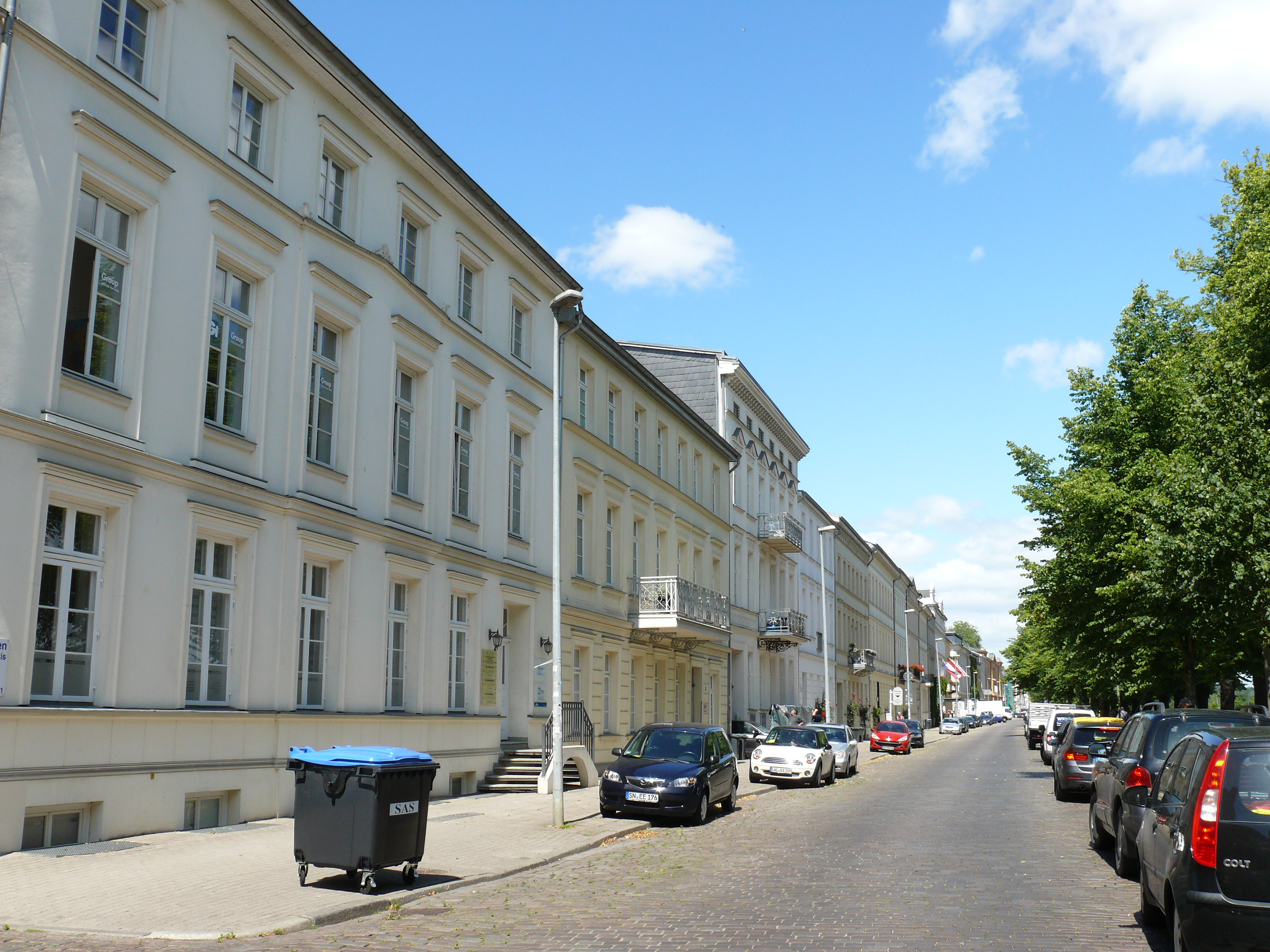 Der Straßenzug mit den denkmalgeschützten Gebäuden "Alexandrinenstraße 2-10" in Schwerin.